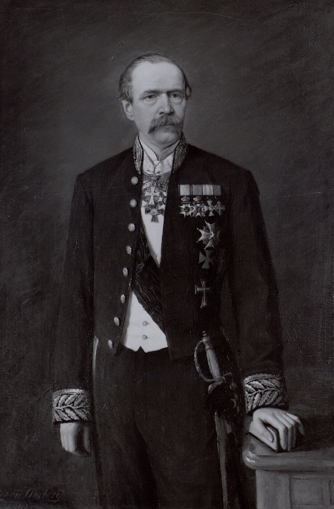 Porträtt av överstelöjtnant Daniel Nordlander (1829-1890).